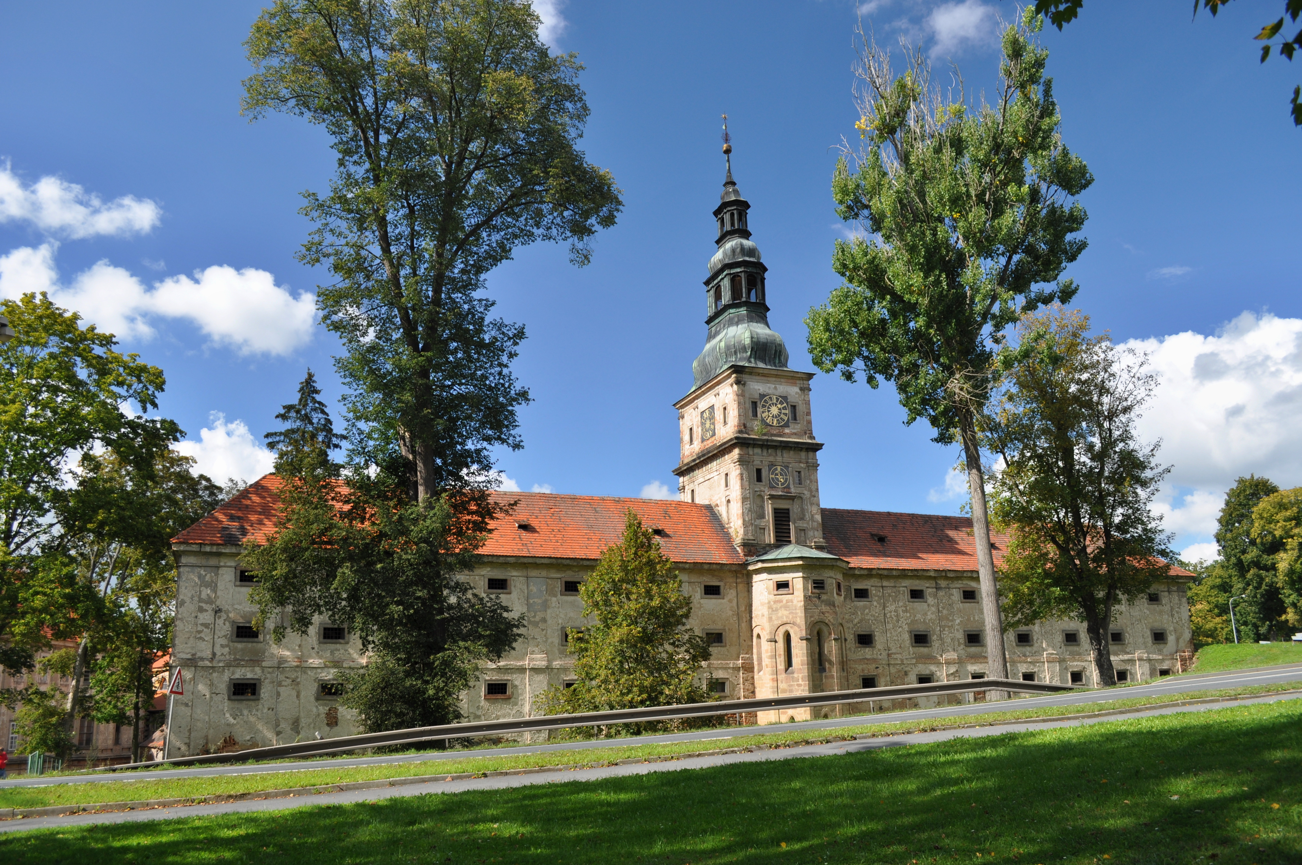 Klášter Plasy, sýpka s Královskou kaplí a hodinovou věží